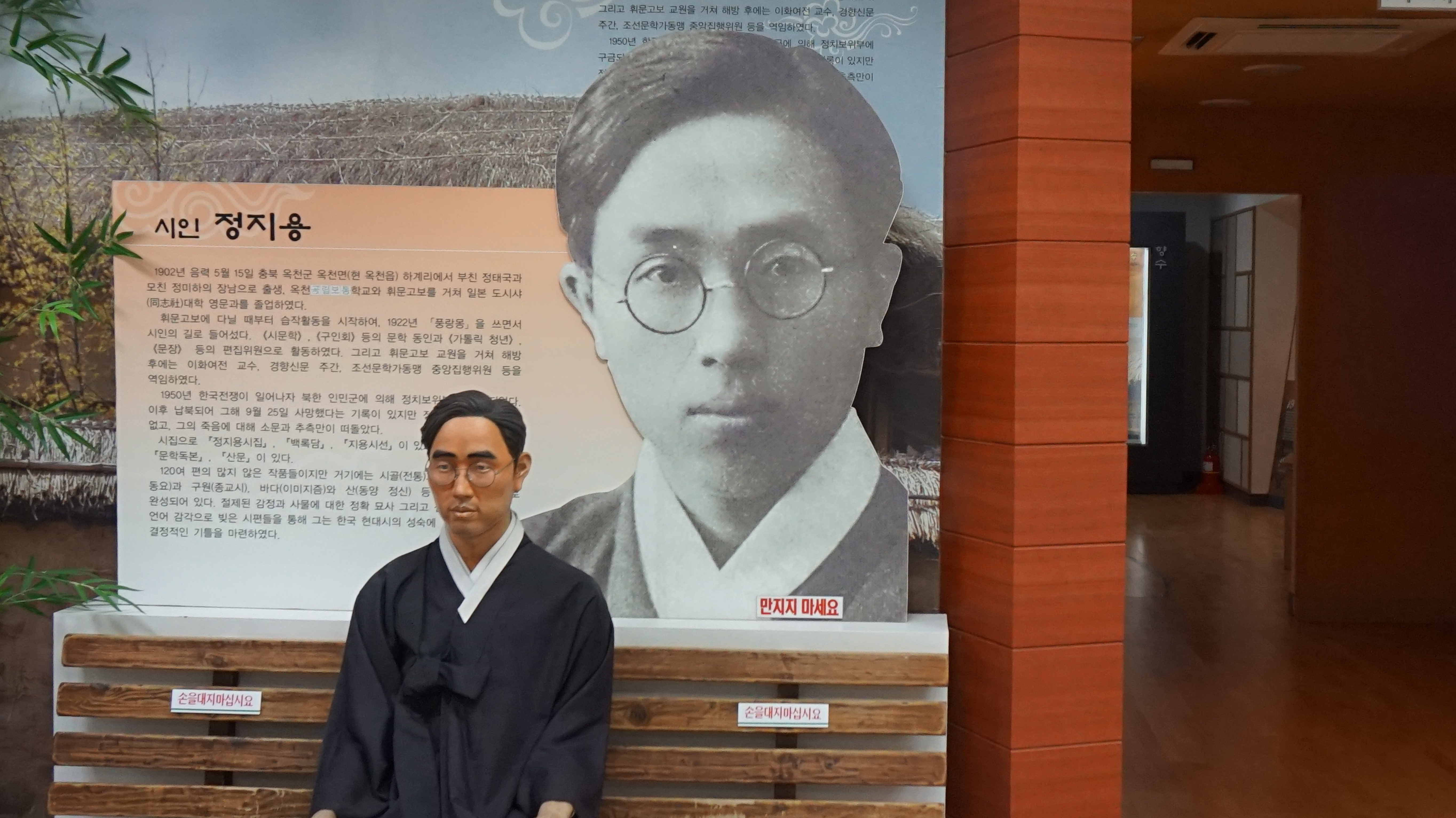 정지용 문학관 설명